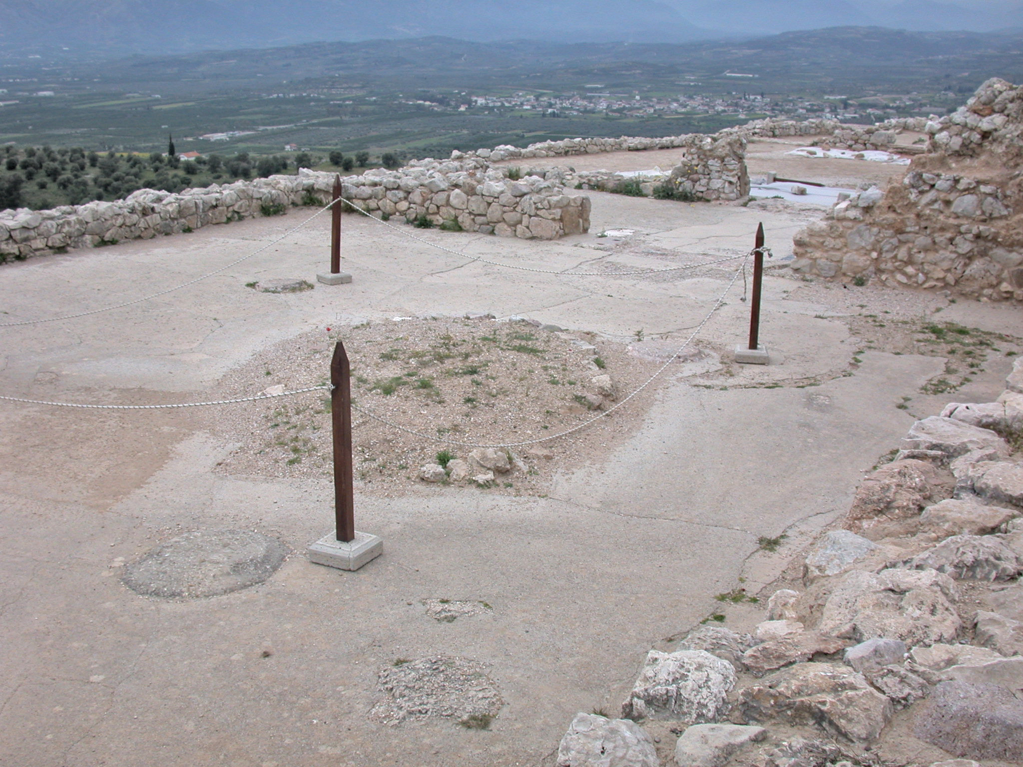 Mycenae, Megaron